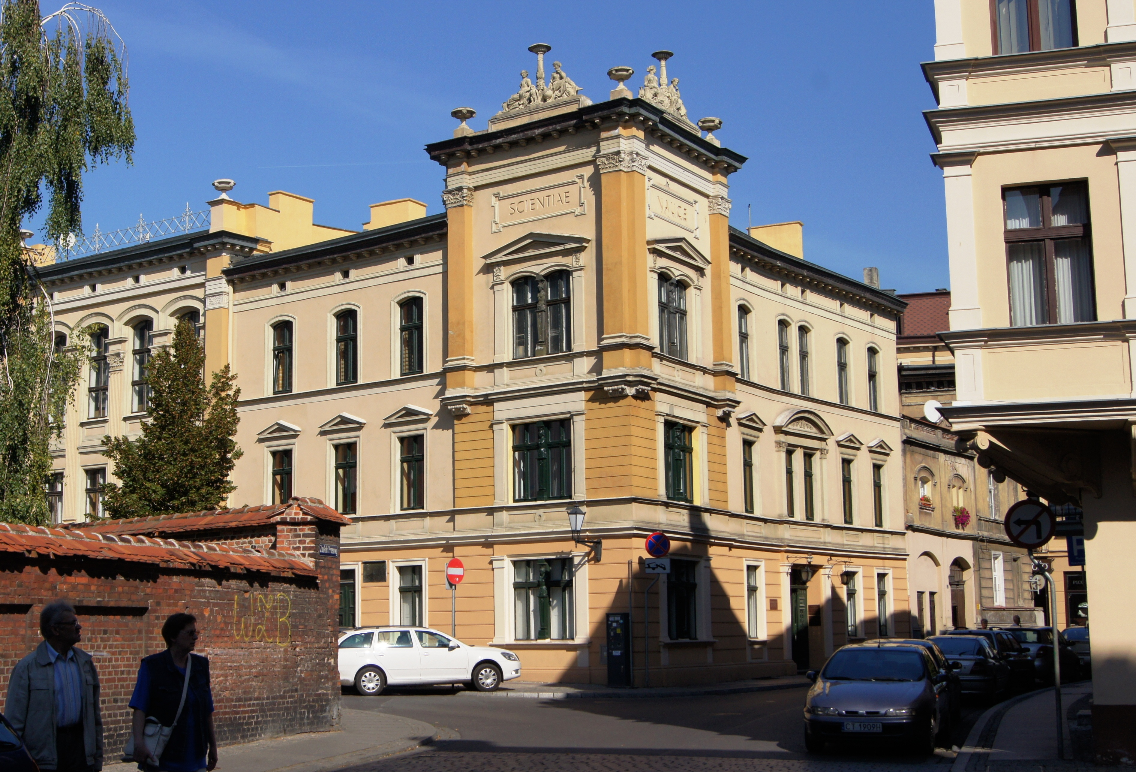 Toruń, ul. Wysoka 16 - budynek Toruńskiego Towarzystwa Naukowego, następnie „Książnica Miejska”, 1881-1882 (zabytek nr A/94)